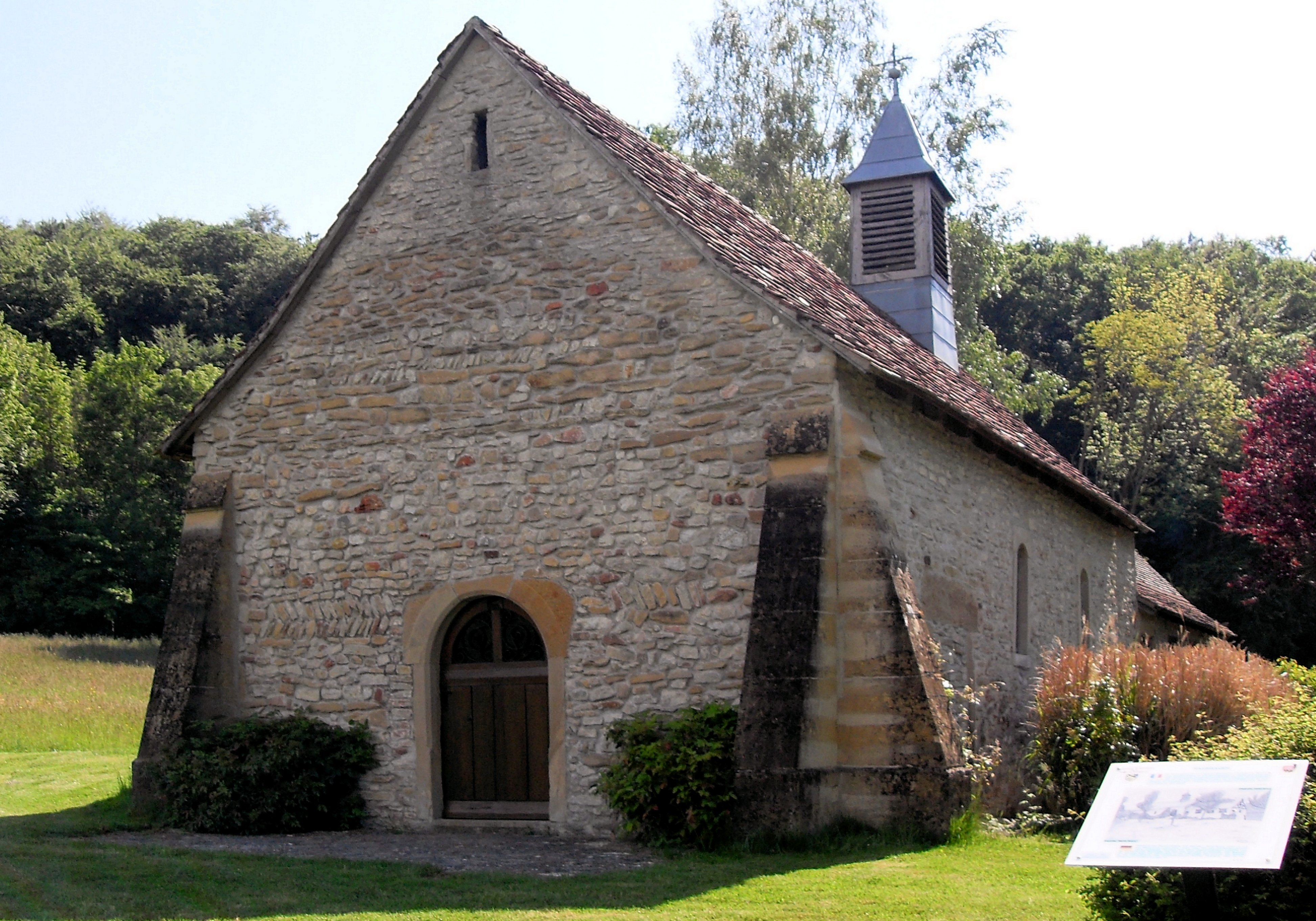 La chapelle Saint-Brice à Hausgauen